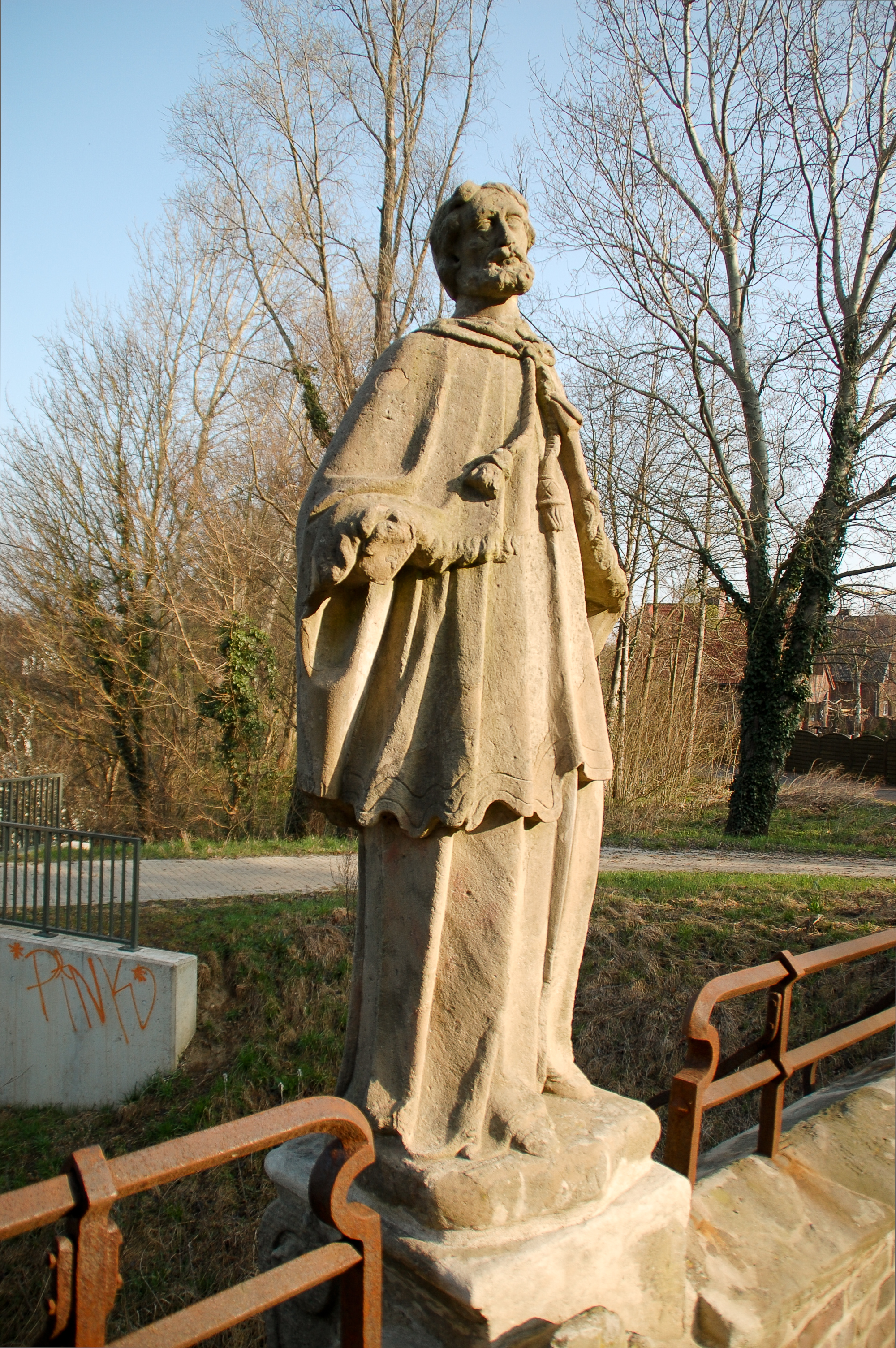 Statue of Johannes von Nepomuk at Johannisbrücke in Gymnich, Erftstadt, Germany